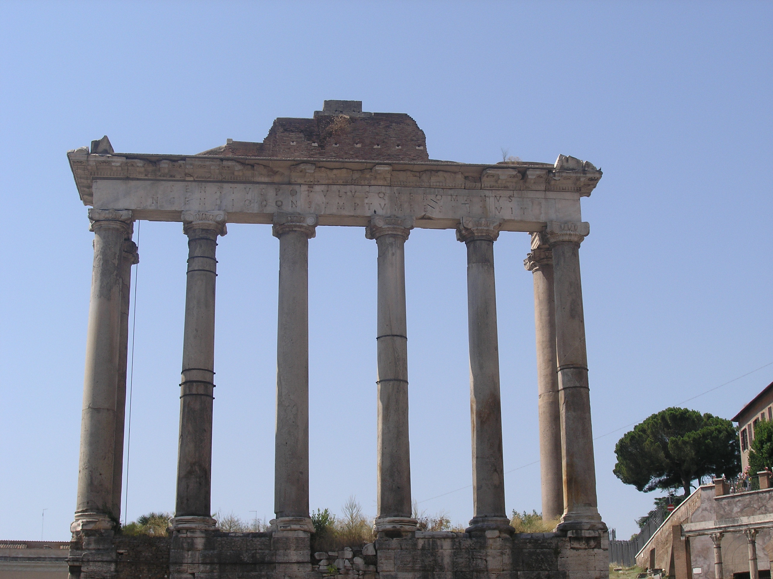 Forum Romanum in Rom, Italien.